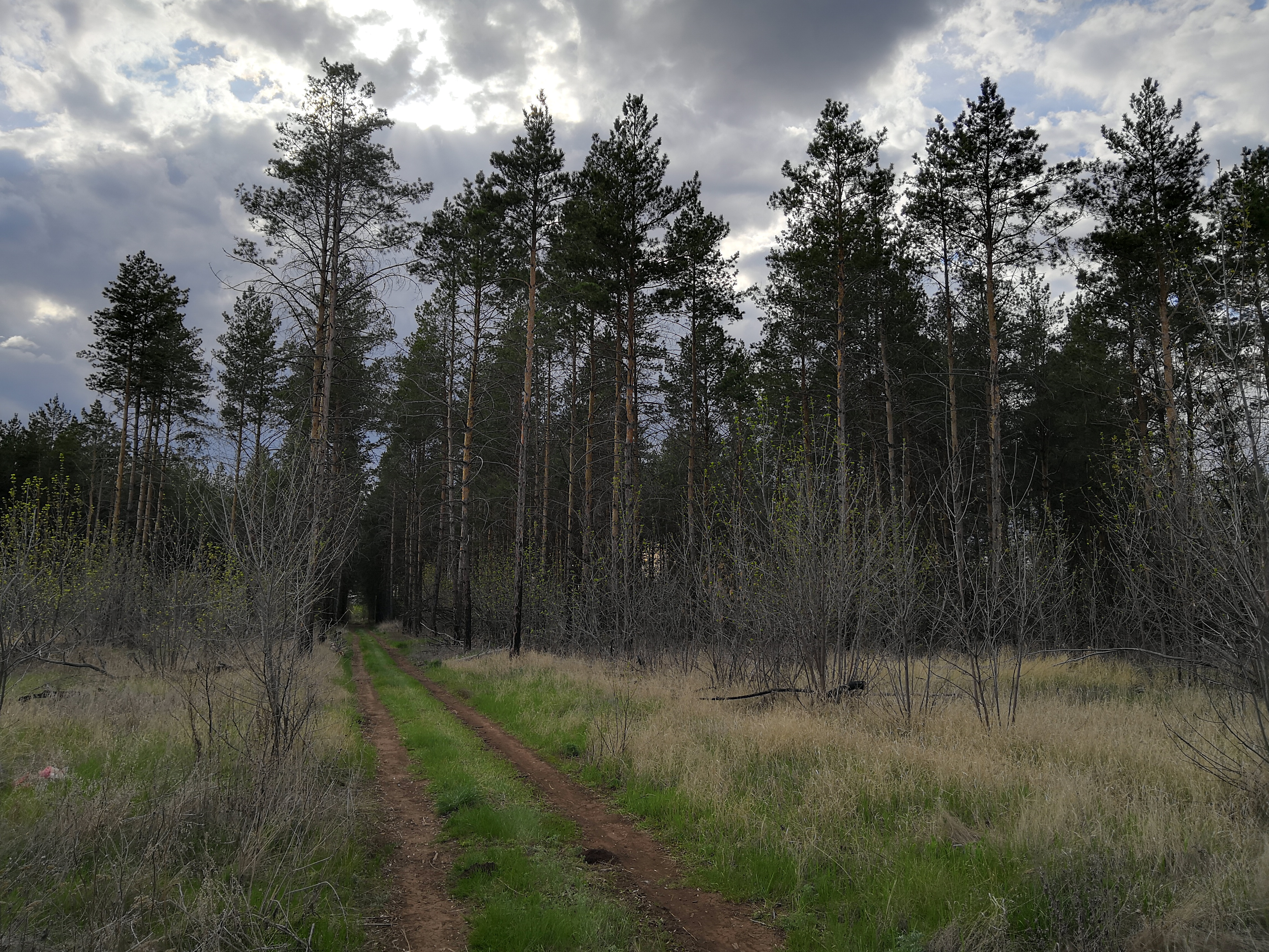 сосновые насаждения в лесу Качкарка